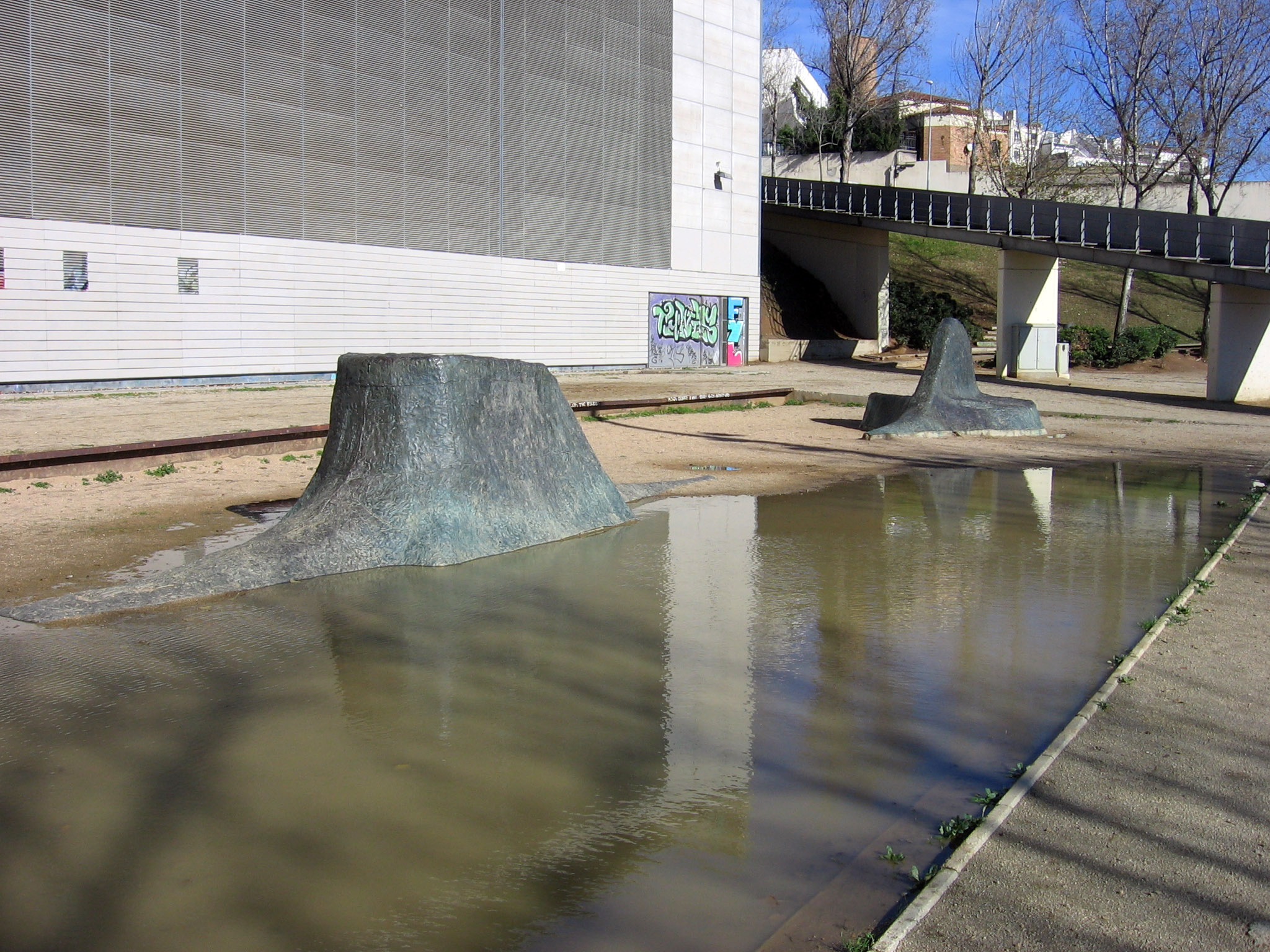 El submarino enterrado, de Josep Maria Riera i Aragó. Parc de les Aigües (Barcelona).